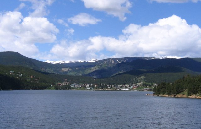 Nederland, Colorado.